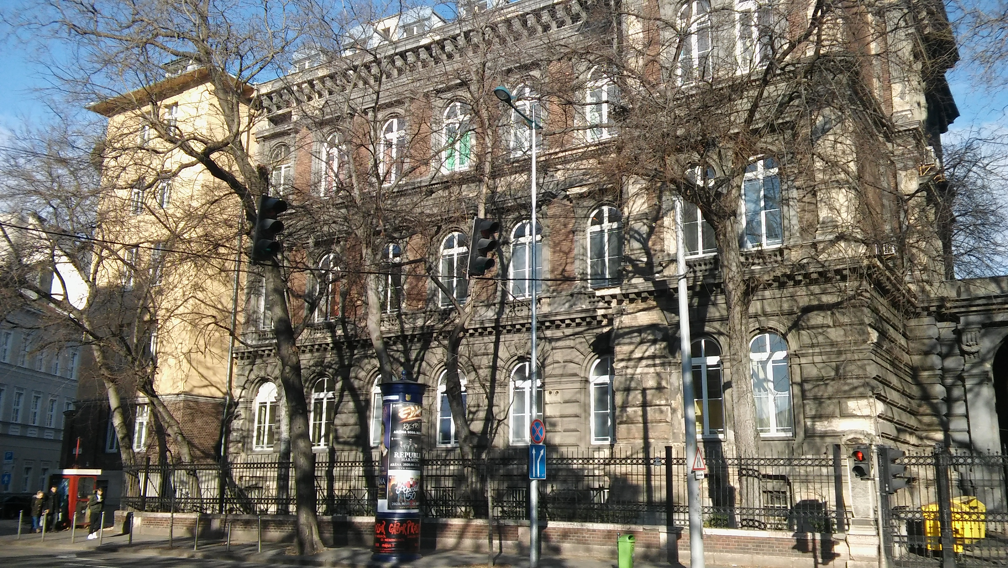 Belső klinikai tömb